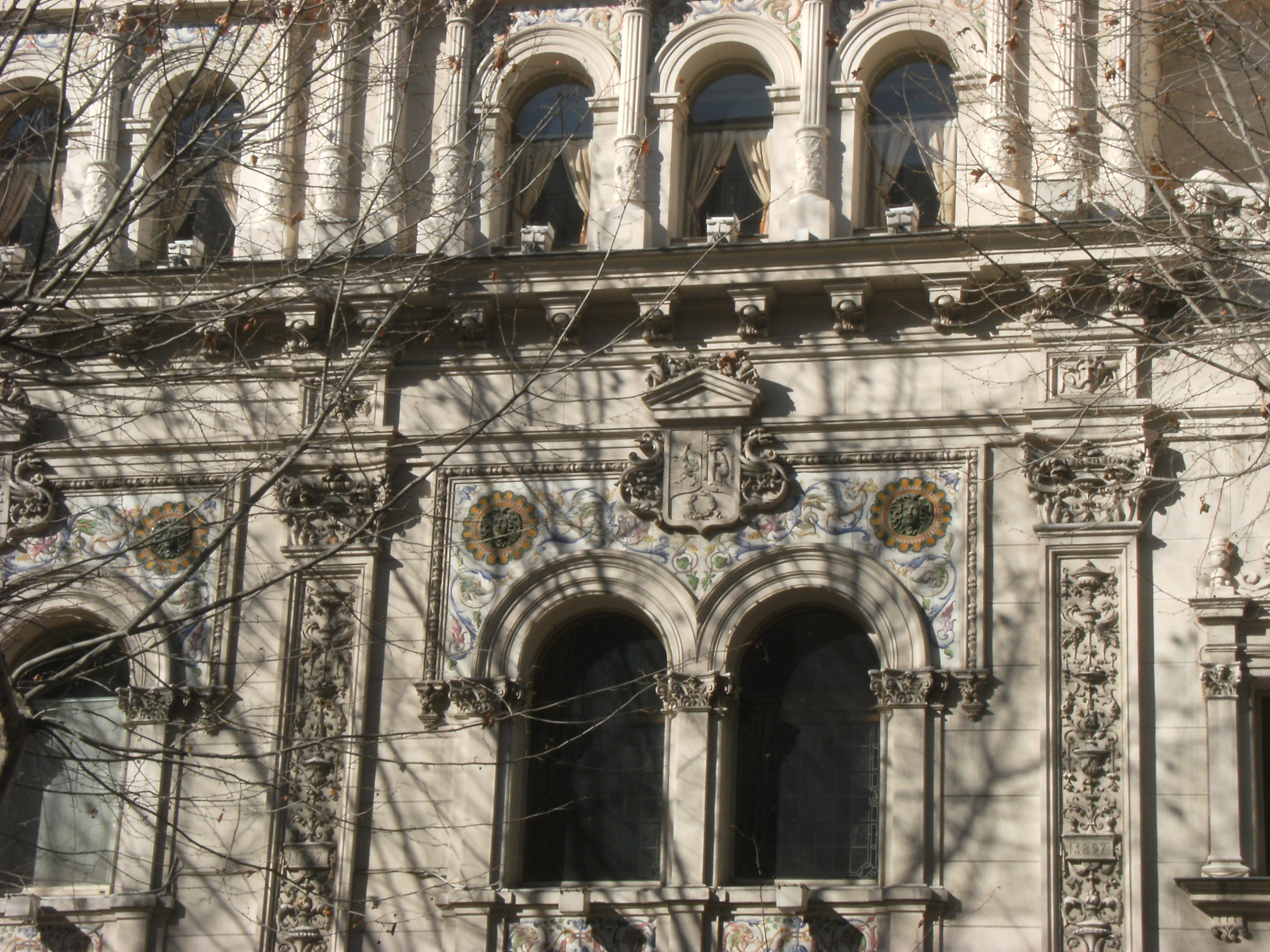 Detalle de la fachada del edificio ABC Blanco y Negro de Madrid